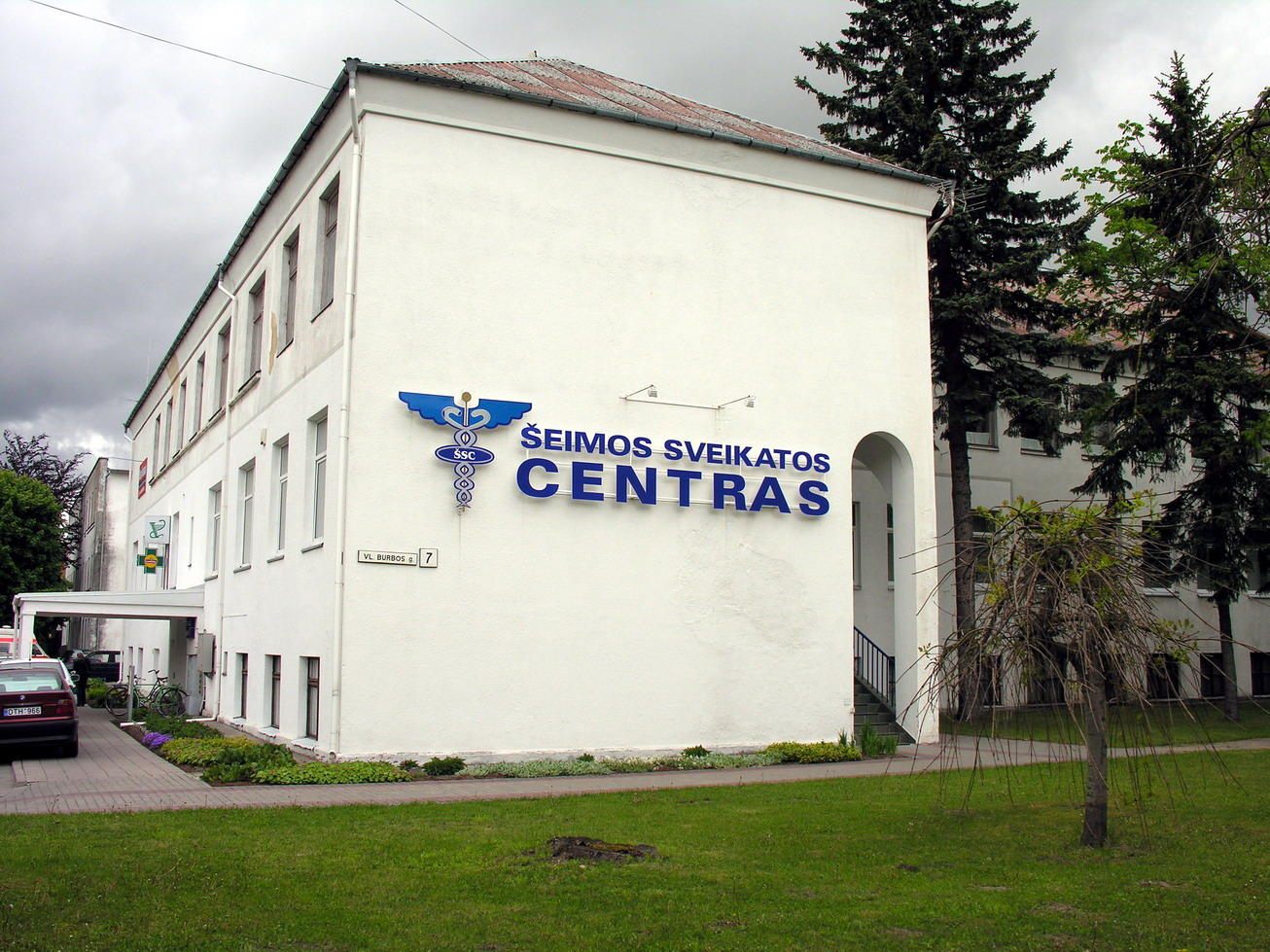 Mažeikių šeimos sveikatos centras Foto: Algirdas, 2006 m. gegužės 30 d.